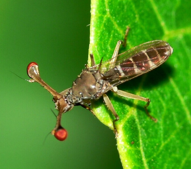 Stielaugenfliege (unknown species) in Kamerun, Banyang Mbo Research Station